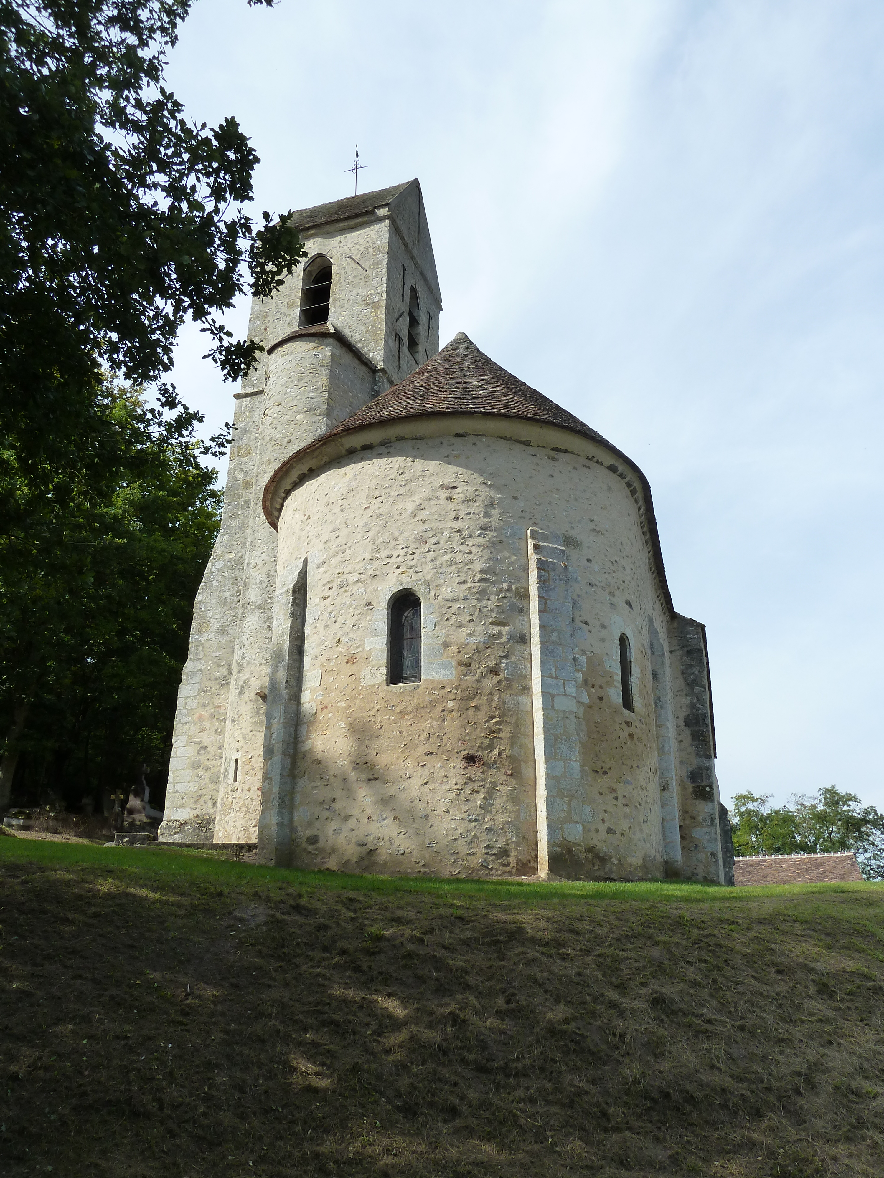 Érigée sur une butte, l'église vue coté du village, sur la petite route du cimetière